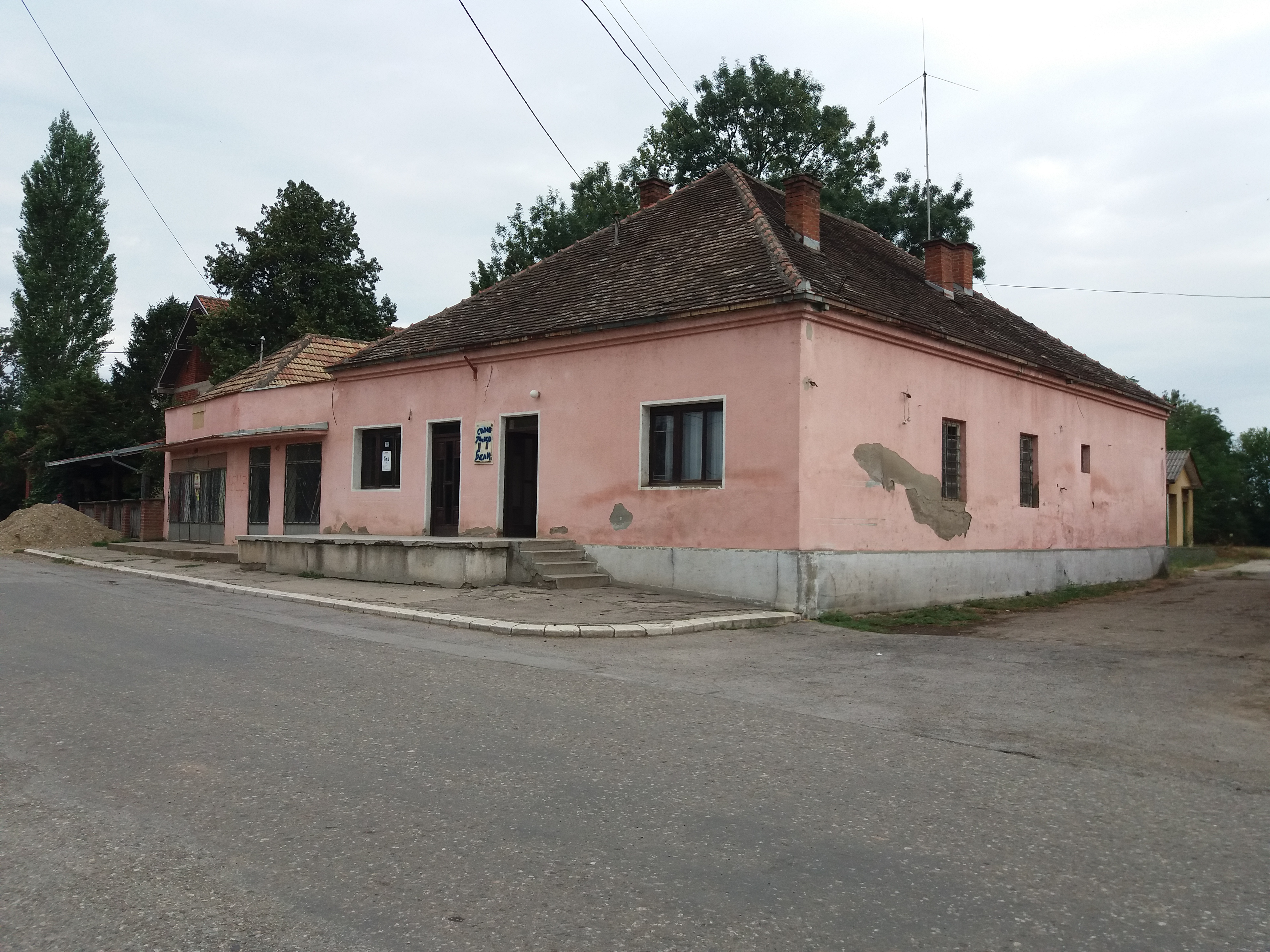 Srpski (latinica): Mesna zajednica, Bačinac